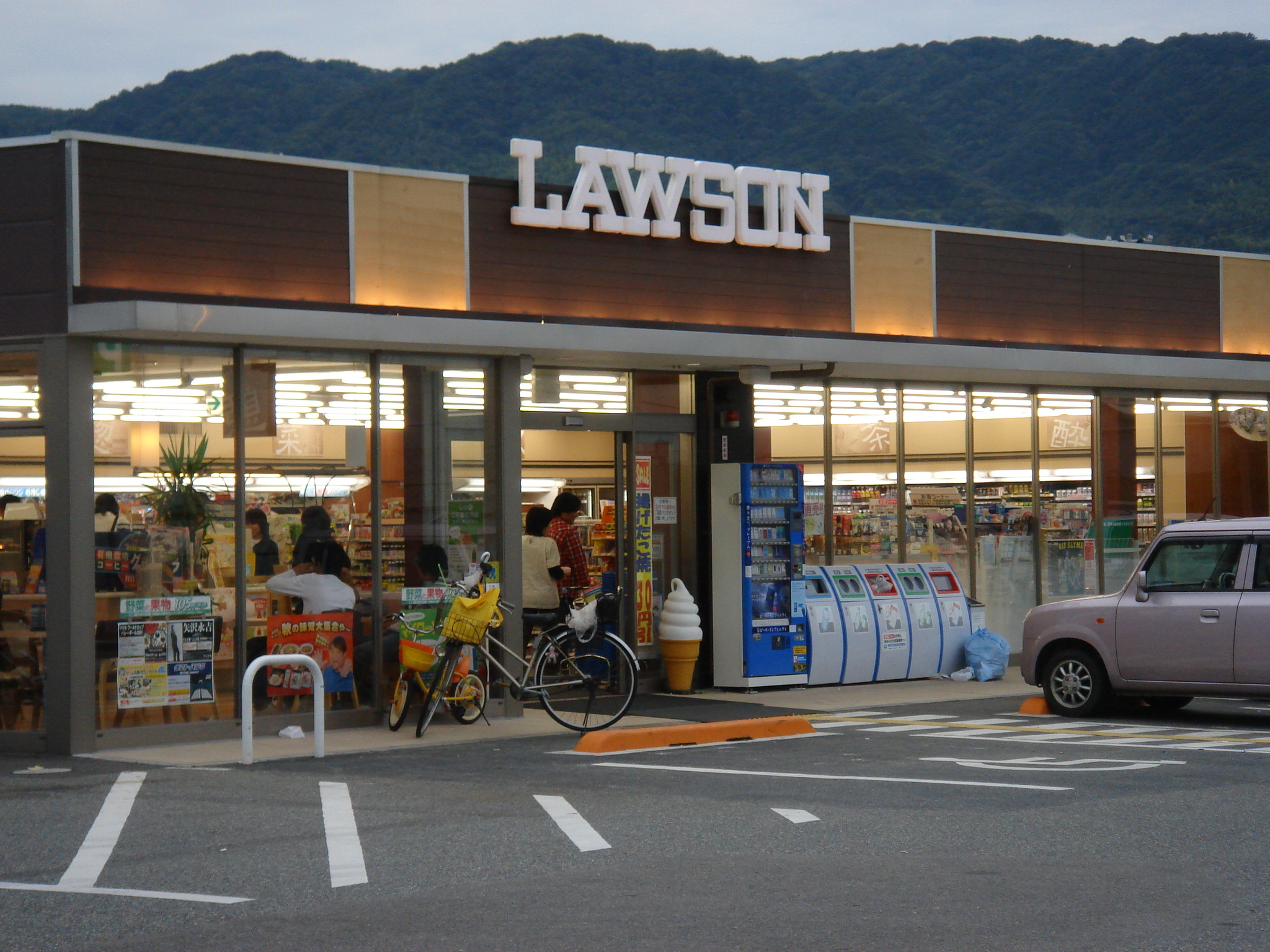 ローソンプラス・東浦町浦店